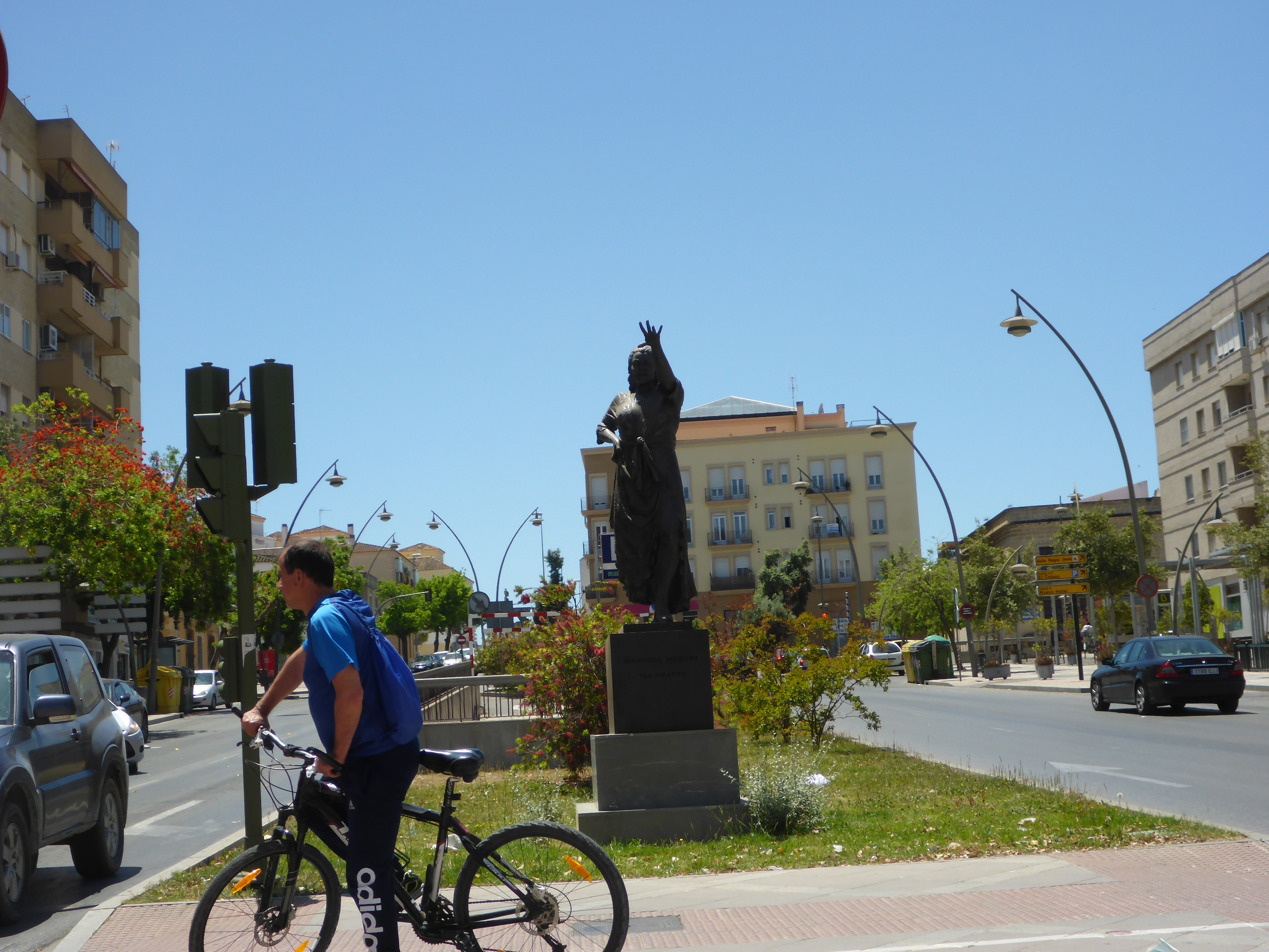 Monumento a Manuela Mendez "La Chati de Jerez"